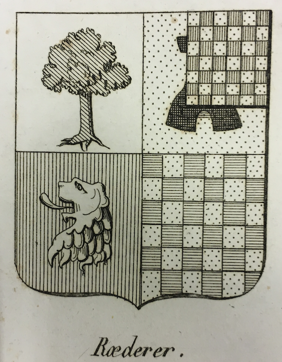 Armoiries d'Antoine-Marie Roederer (1782-1865) en 1812 : Ecartelé : au 1, d’argent au chêne arraché de sinople (brisé des armes de son père Pierre-Louis comte Roederer) ; au 2, d’or à la tour de sable, ouverte et ajourée du même ; au 3, de gueules à la tête de lion arrachée d’argent ; au 4, échiqueté d’or et d’azur ; au franc-quartier de baron tiré du conseil d’état, brochant au neuvième de l'écu.